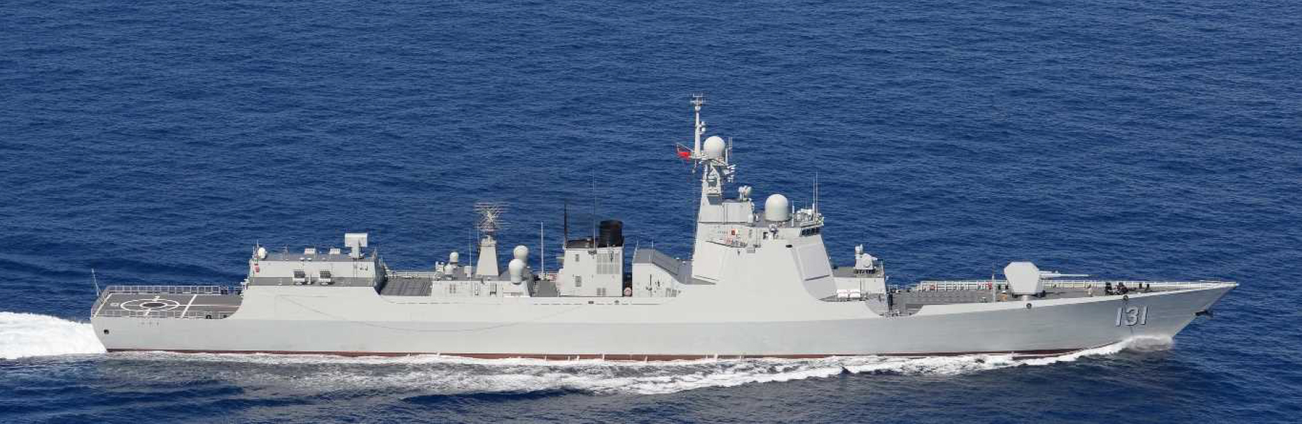 ７月２７日（土）午前７時頃、海上自衛隊第５航空群所属「Ｐ－３Ｃ」（那覇）及び佐世保地方隊所属「あまくさ」（佐世保）が、宮古島の北約２４０ｋｍの海域を南下する中国海軍ルーヤンⅢ級ミサイル駆逐艦１隻、ジャンカイⅡ級フリゲート１隻の計２隻を確認した。 その後、これらの艦艇が沖縄本島と宮古島の間の海域を南下し、太平洋へ向けて航行したことを確認した。